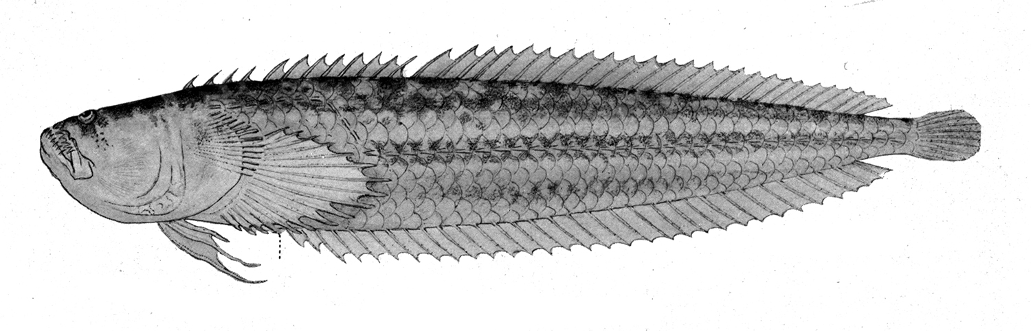 Dactyloscopus amnis